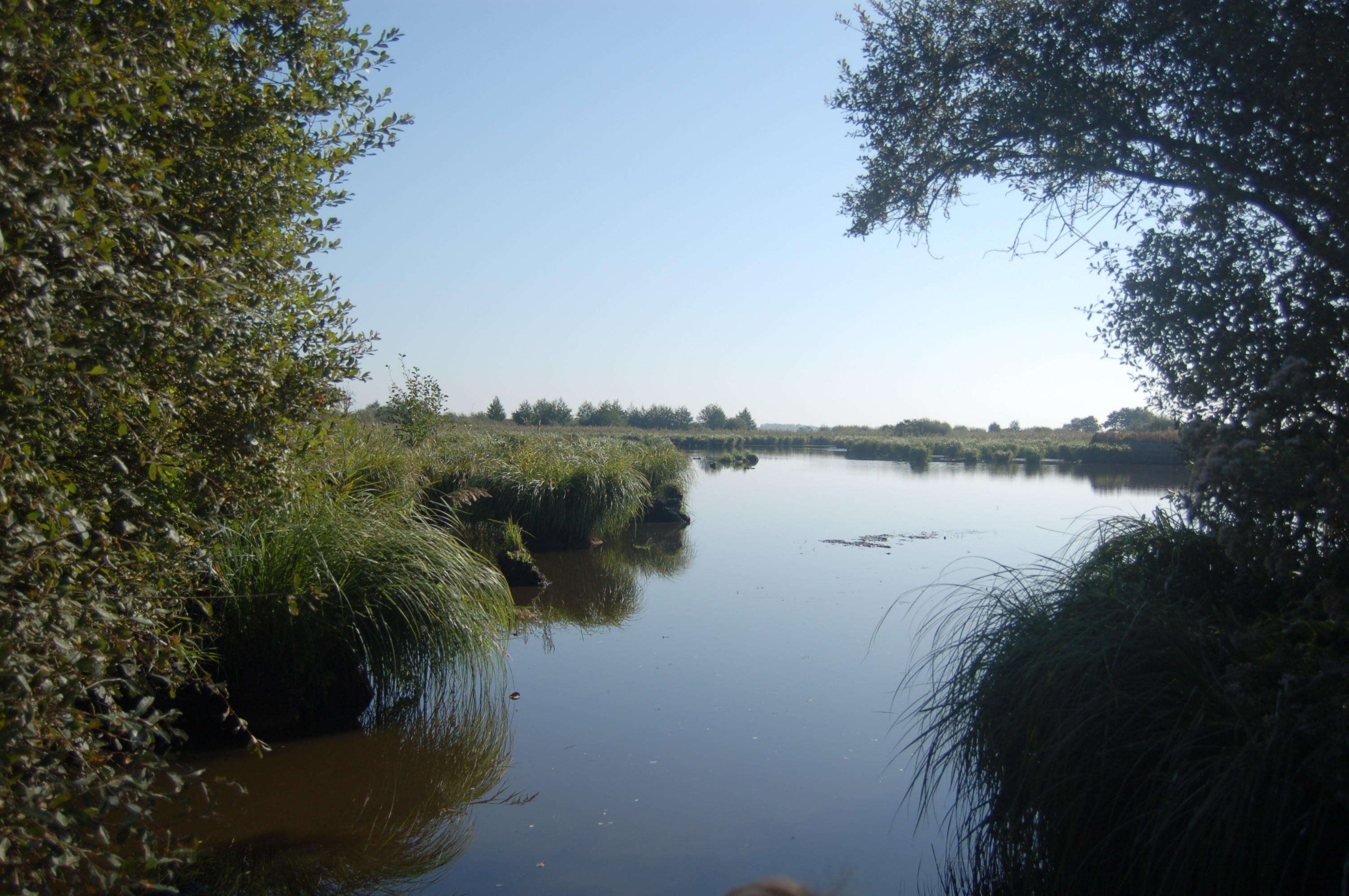 Canal en Brière